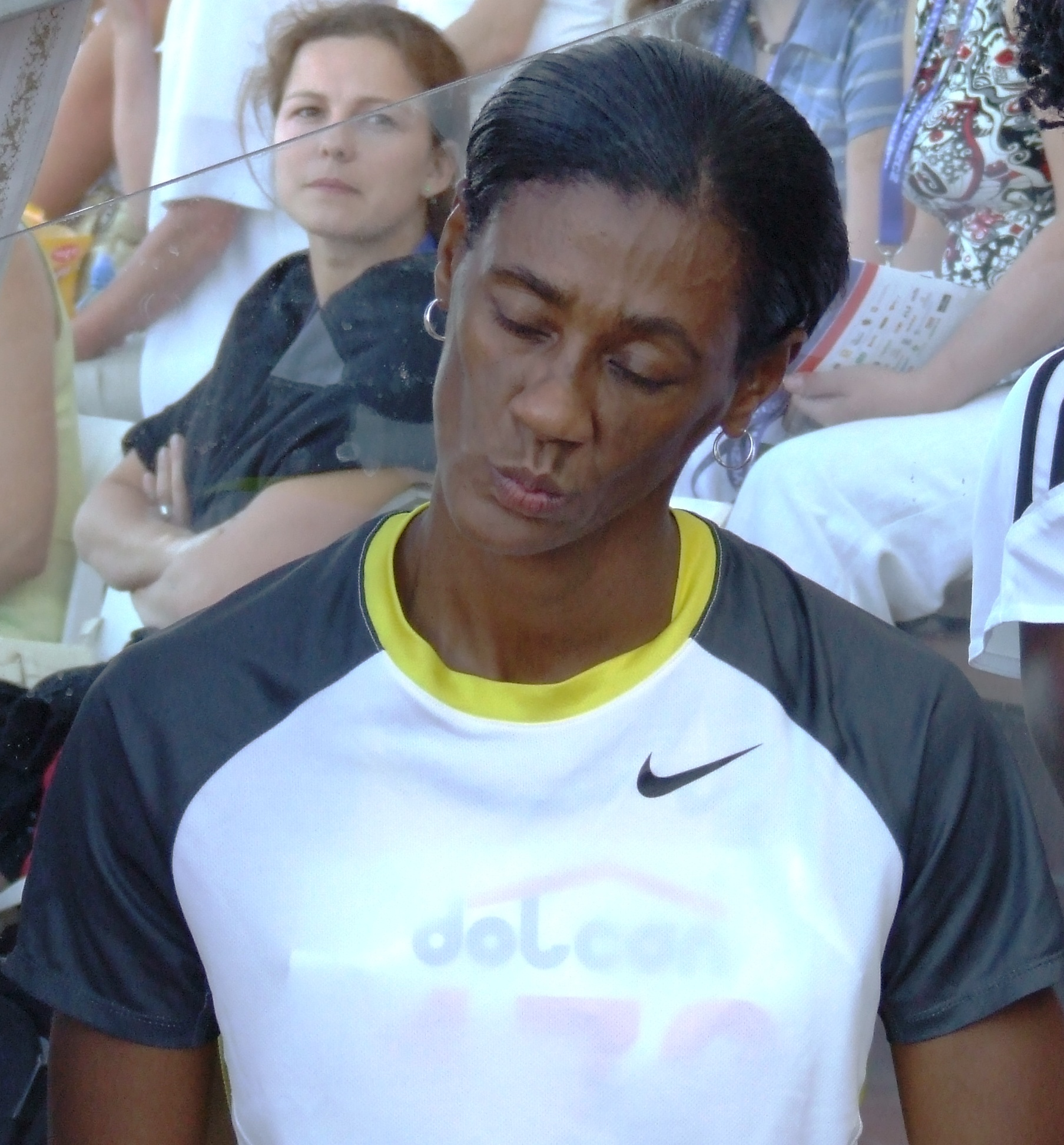 Sandra Glover, amerykańska biegaczka (400 m ppł), Bydgoszcz Dolcan Cup 2007